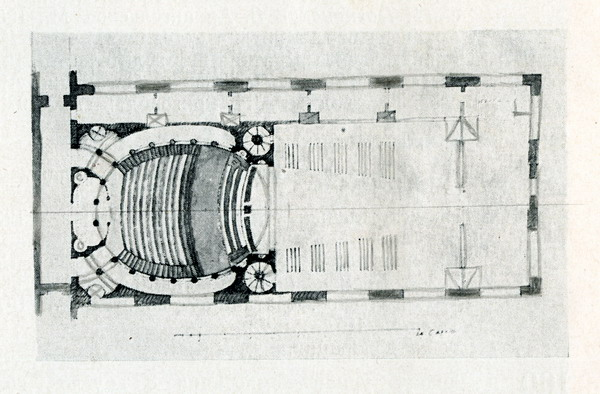 Театр. Архангельське: садибний театр М. Юсупова